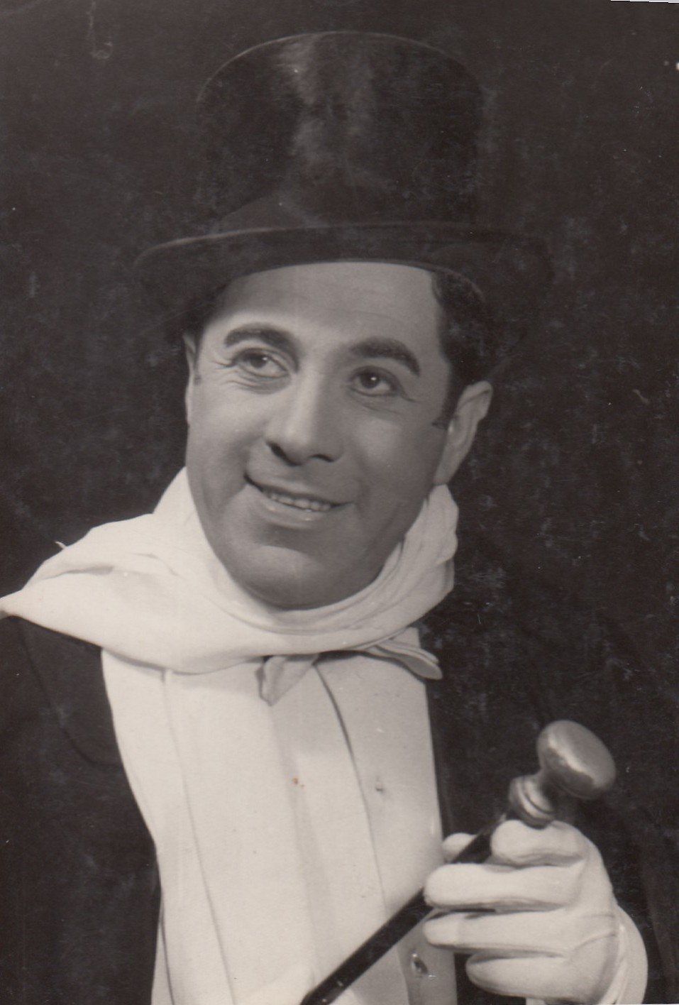 Mucsi Sándor (1926-2006) színművész az Ártatlan Zsuzsiban, Szolnok